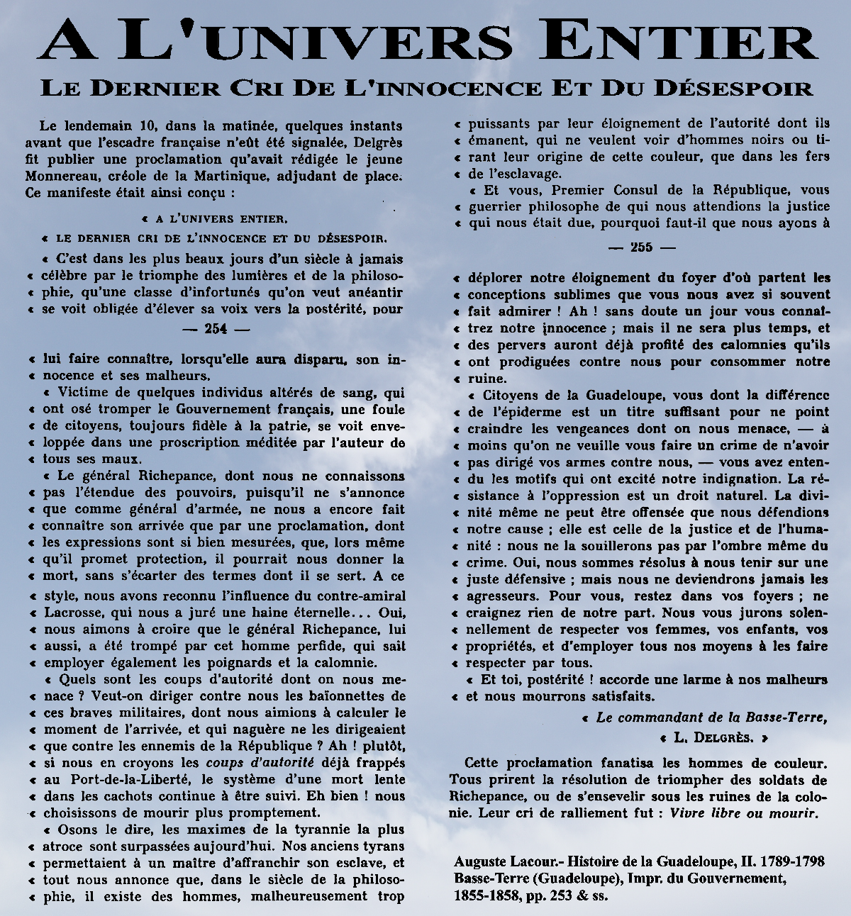 Mise en page du manifeste "A L'univers Entier. Le Dernier Cri De L'innocence Et Du Désespoir". Le 10 mai 1802, dans la matinée, quelques instants avant que l'escadre française n'eût été signalée sur les côtes de la Guadeloupe, Delgrès fit publier une proclamation rédigée par Monnereau, adjudant de place.